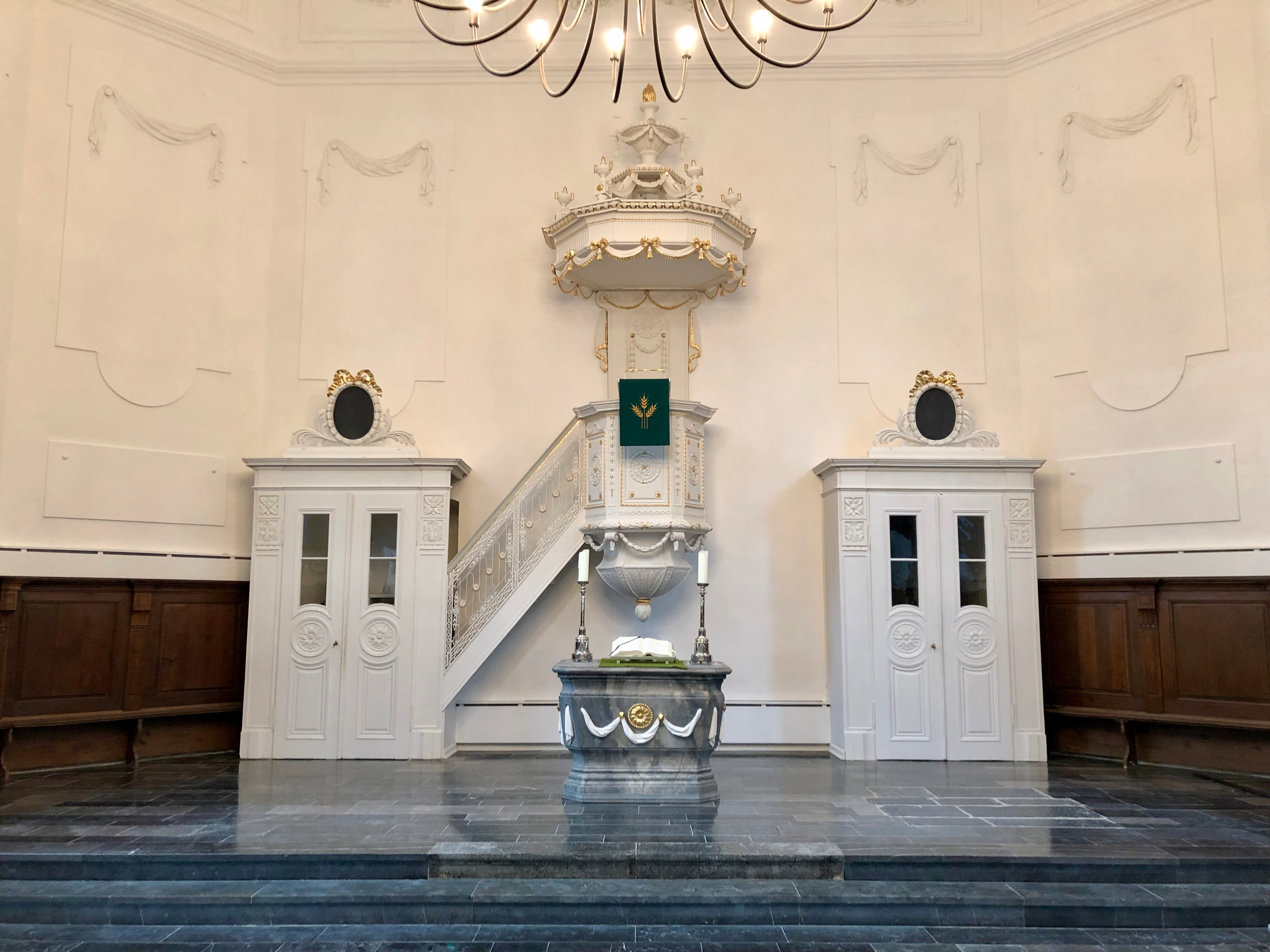 Stadtkirche Monschau, Prinzipalwand, Stand Januar 2019